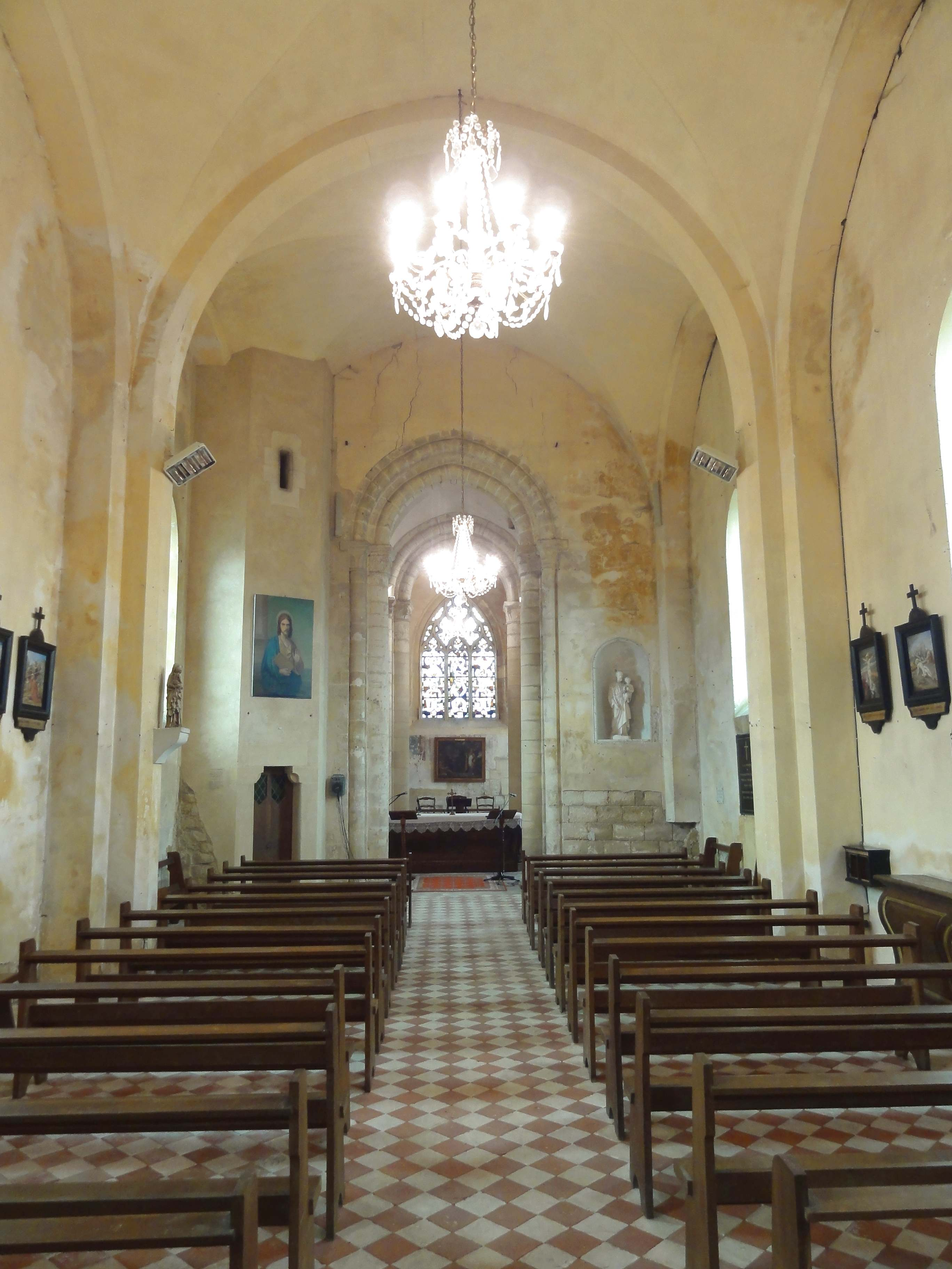 Intérieur de l'église (voir titre).